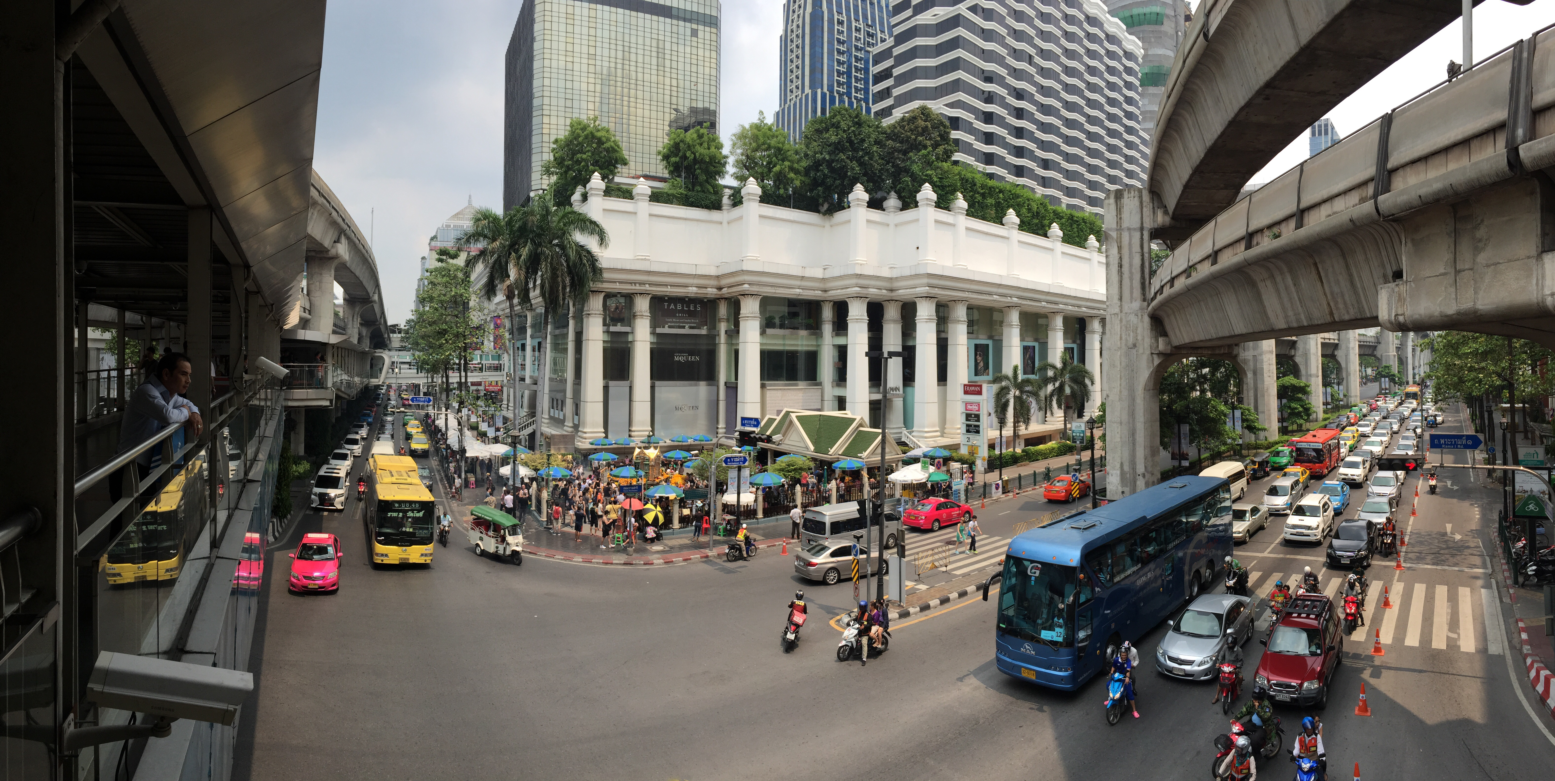 Pathum Wan, Bangkok 10330, Thailand